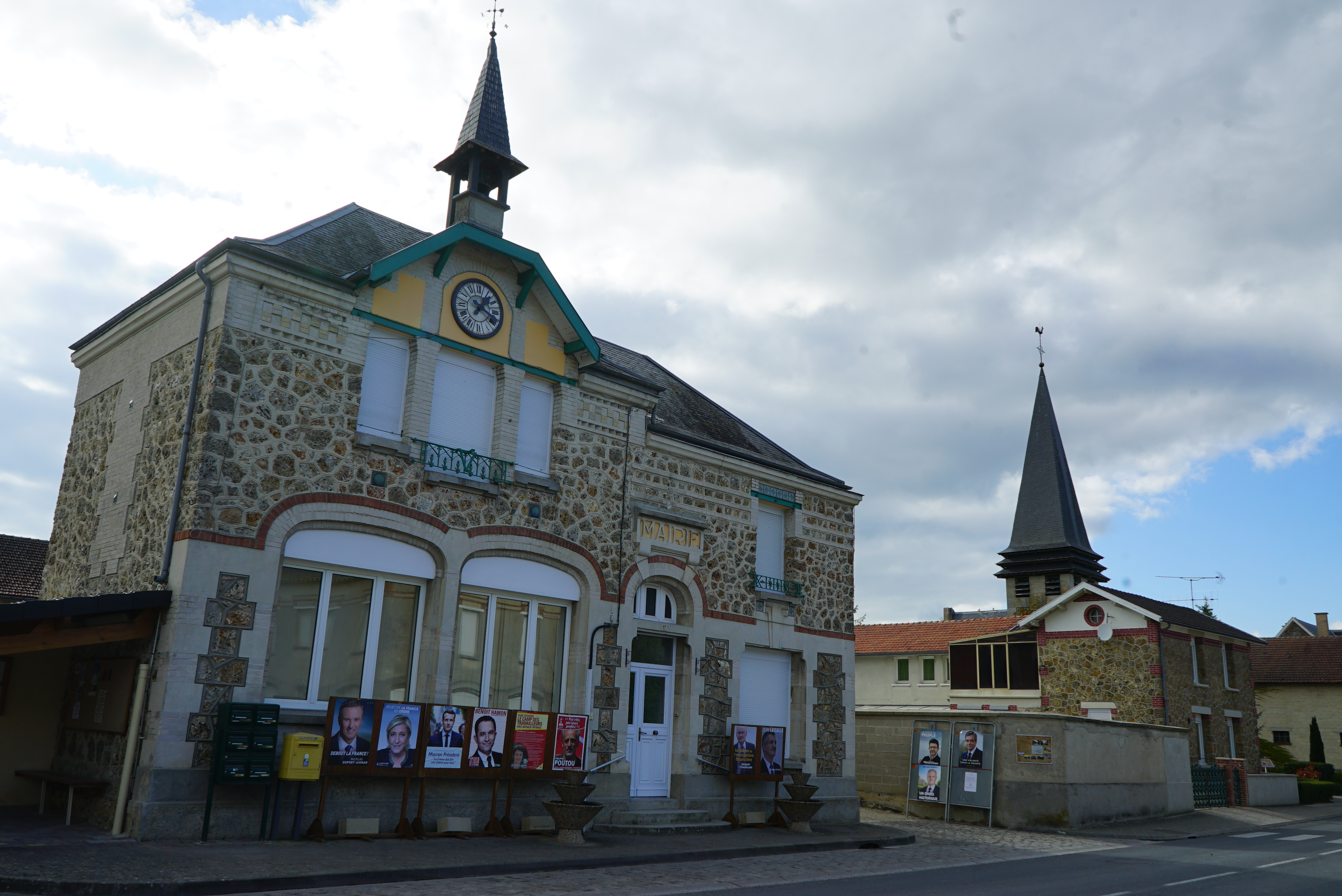 à l'occasion du "centenaire de la bataille des monts de champagne".